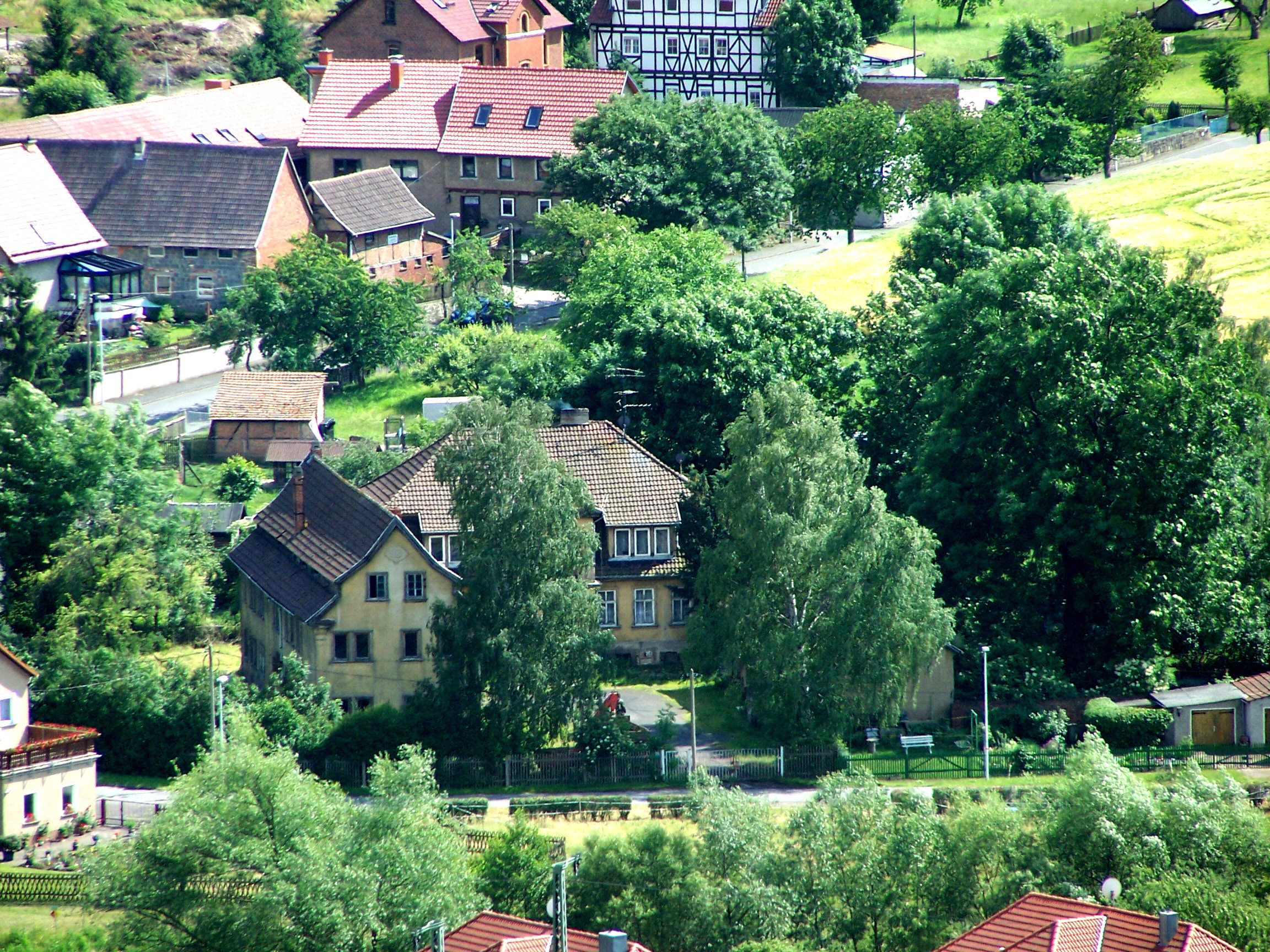 Das ehemalige Gut Rothenhof im Osten der Stadt Eisenach.